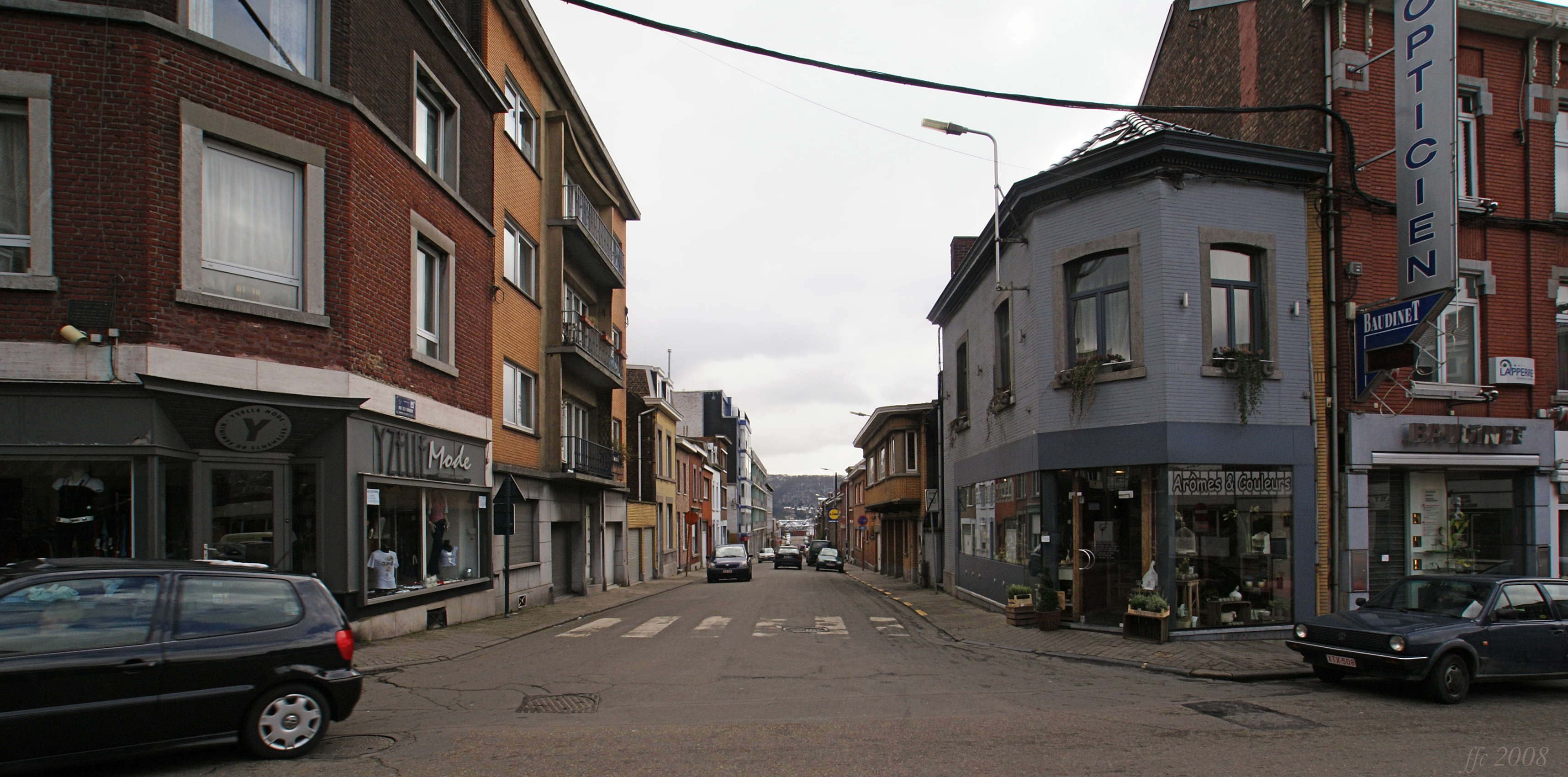 Herstal (Belgium) Typical central street: "rue des Mineurs" Carrer típic: rue des Mineurs rue typique: rue des mineurs